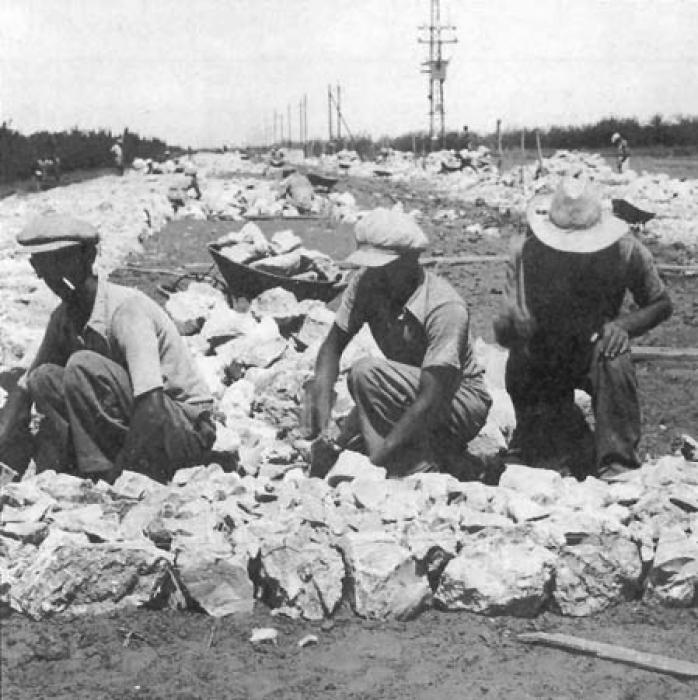 עובדים על סלילת הכביש מנתניה לטול כרם